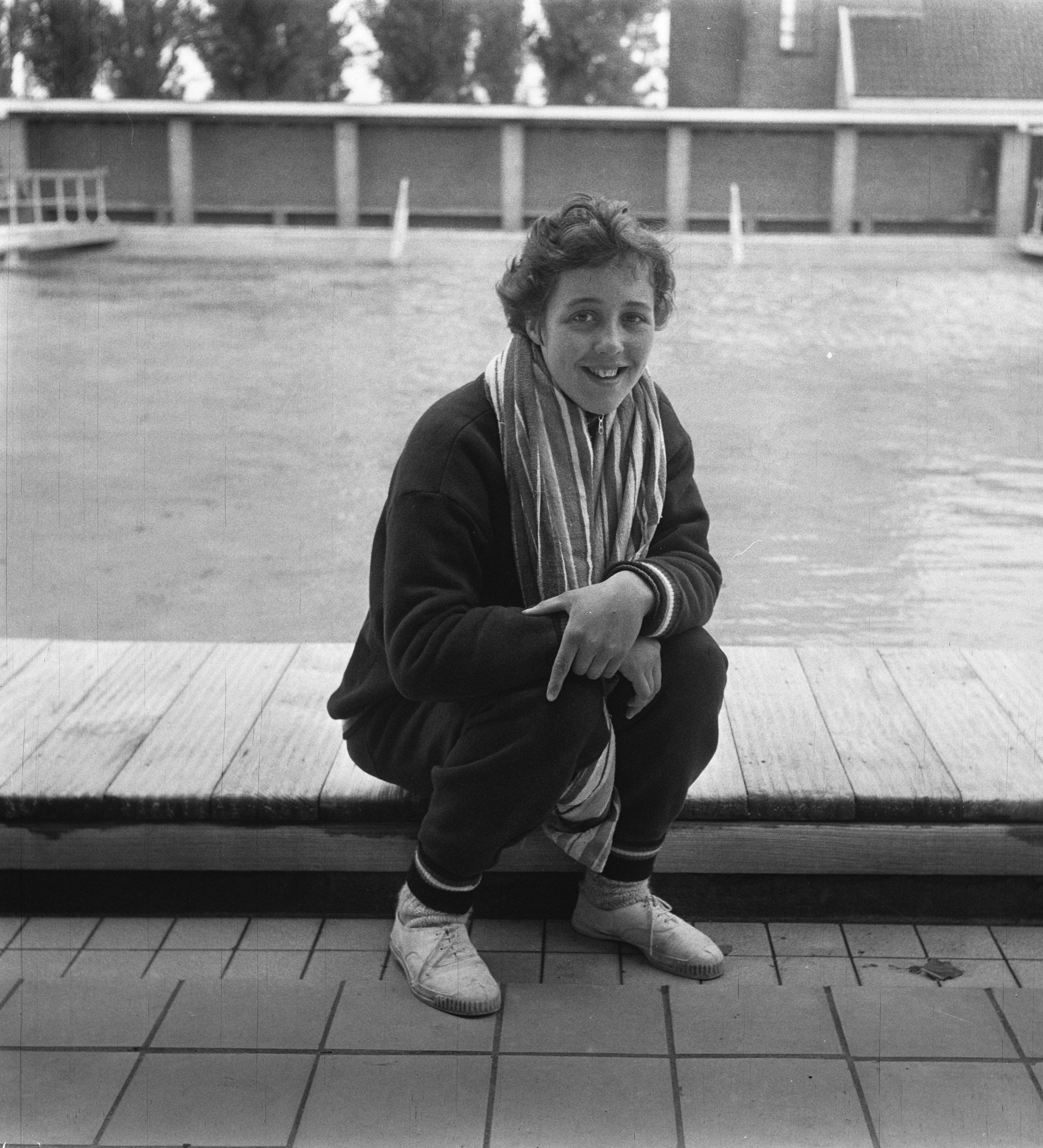 Collectie / Archief : Fotocollectie Anefo Reportage / Serie : [ onbekend ] Beschrijving : Nationale zwemkampioenschappen Amsterdam Jans Koster Datum : 2 september 1956 Locatie : Amsterdam, Noord-Holland Trefwoorden : zwemkampioenschappen Persoonsnaam : Jans Koster Fotograaf : Noske, J.D. / Anefo Auteursrechthebbende : Nationaal Archief Materiaalsoort : Negatief (zwart/wit) Nummer archiefinventaris : bekijk toegang 2.24.01.03 Bestanddeelnummer : 907-9773